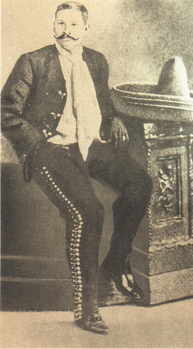 General Jesús Capistrán Yáñez